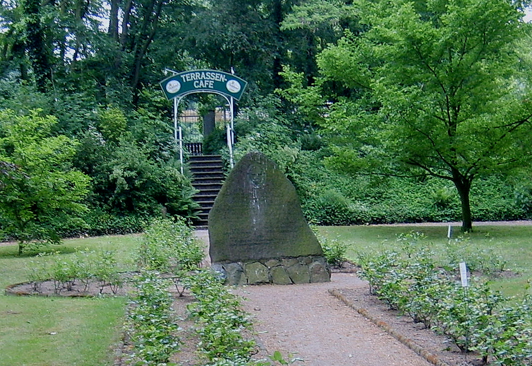 Chronikstein im Schlosspark von Saathain.